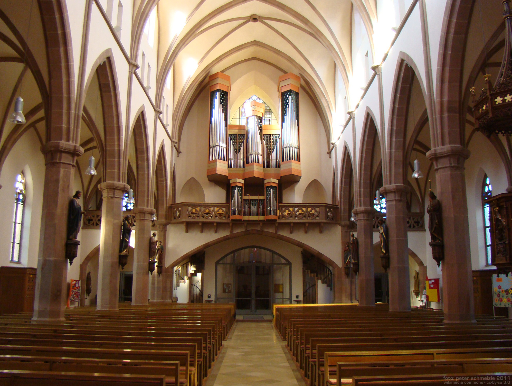 Orgel der Pfarrkirche Unserer lieben Frau in Waibstadt